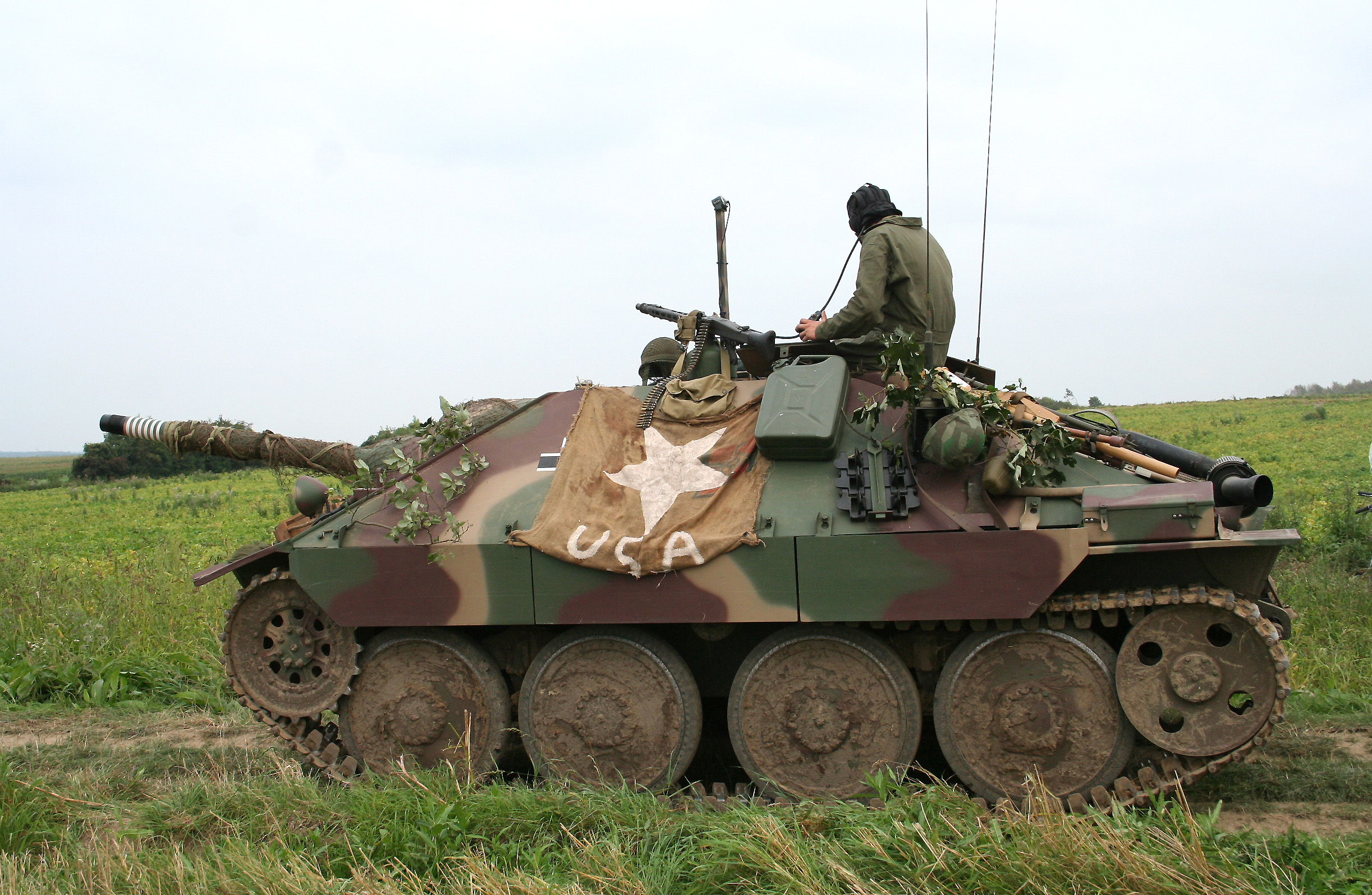 Jagdpanzer 38(t) (Sd.Kfz. 138/2) connu sous le nom de Hetzer, chasseur de char allemand de la seconde guerre mondiale.